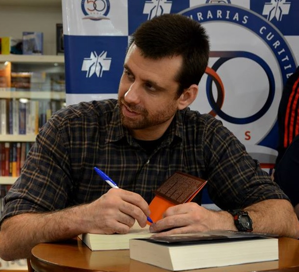 Eduardo Spohr autografando exemplares de Filhos do Éden